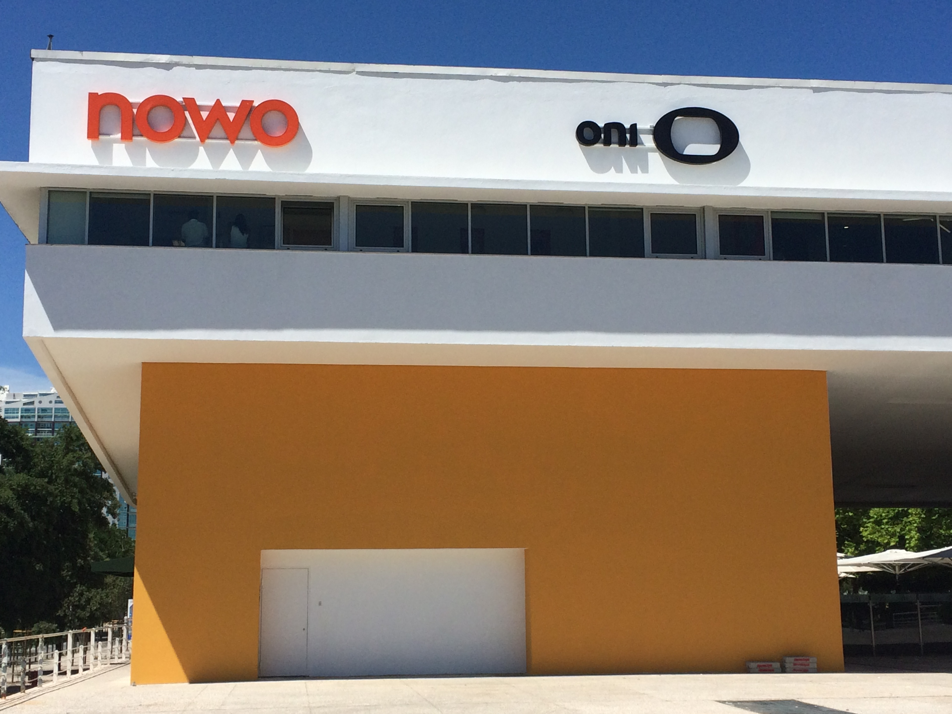 Sede Oni Telecom Parque das Nações